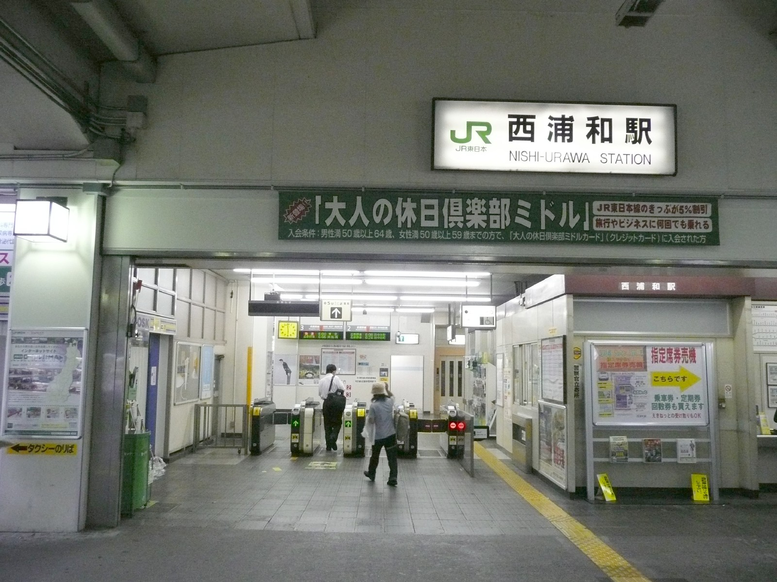 西浦和駅改札口